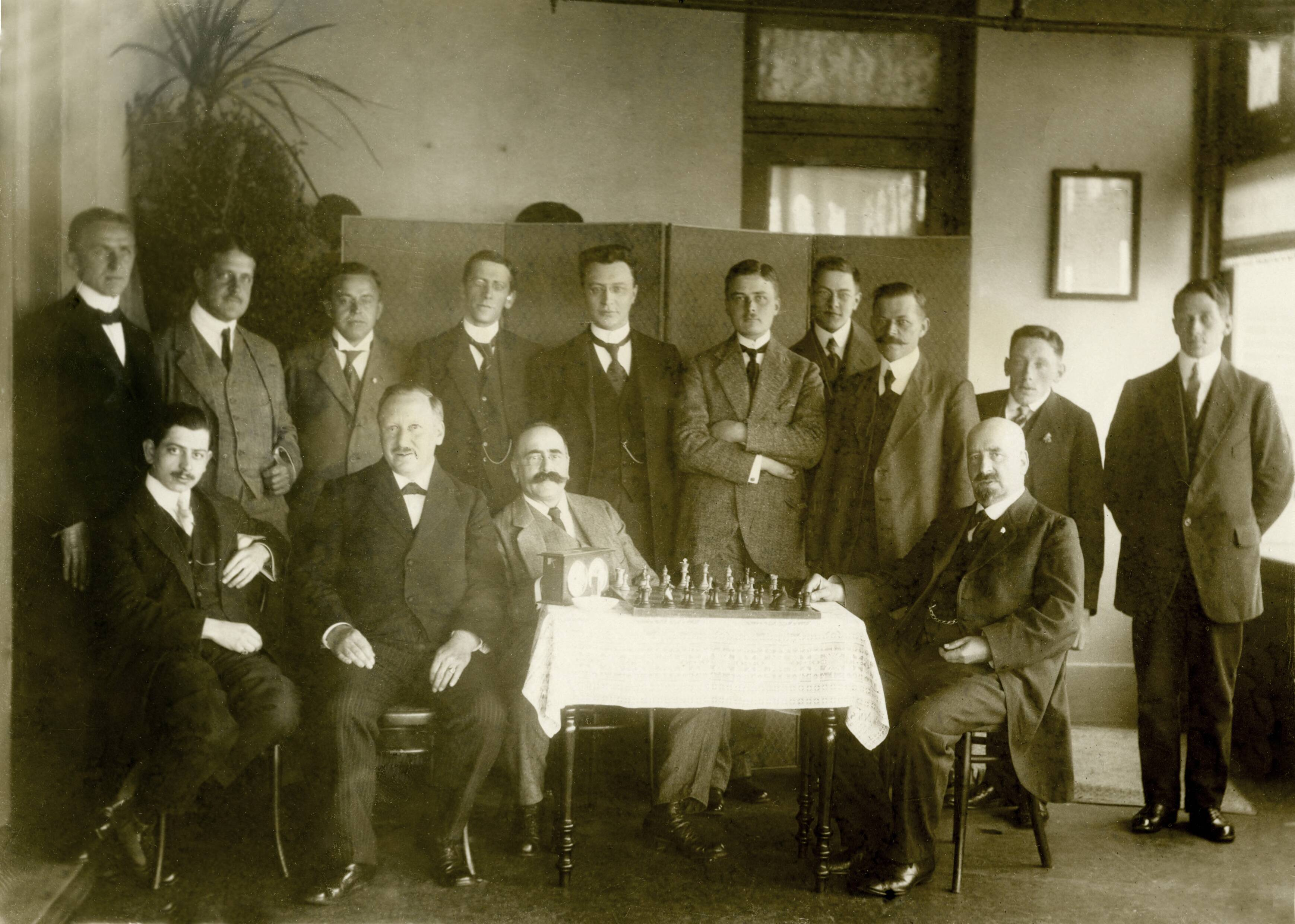 Schaakwedstrijd in Scheveningen. 1915. De heren zitten en staan bij een tafeltje met een schaakbord met schaakstukken. De heren zittend zijn v r.n.l. M. Censer, FJ.G. d'Aumerie (voorzitter S.S.S.) L. Gans, H. Steffelaar. Staand v.r.n.l. J. van Wijk (Sec.), Mr. A. Rueb, O. Garshagen, Mr. G.C.A. Oskam, H. van Hartingsvelt, G.S. Fontein, G.J. van Gelder, K. Geus, G.J.R.v.d.Gaag (comm), M.Marchand.